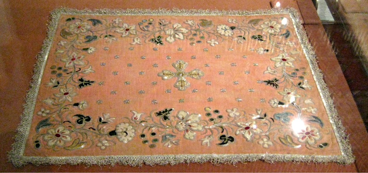 Воздух. Покровцы. 19 век. Кирилло-Белозерский монастырь